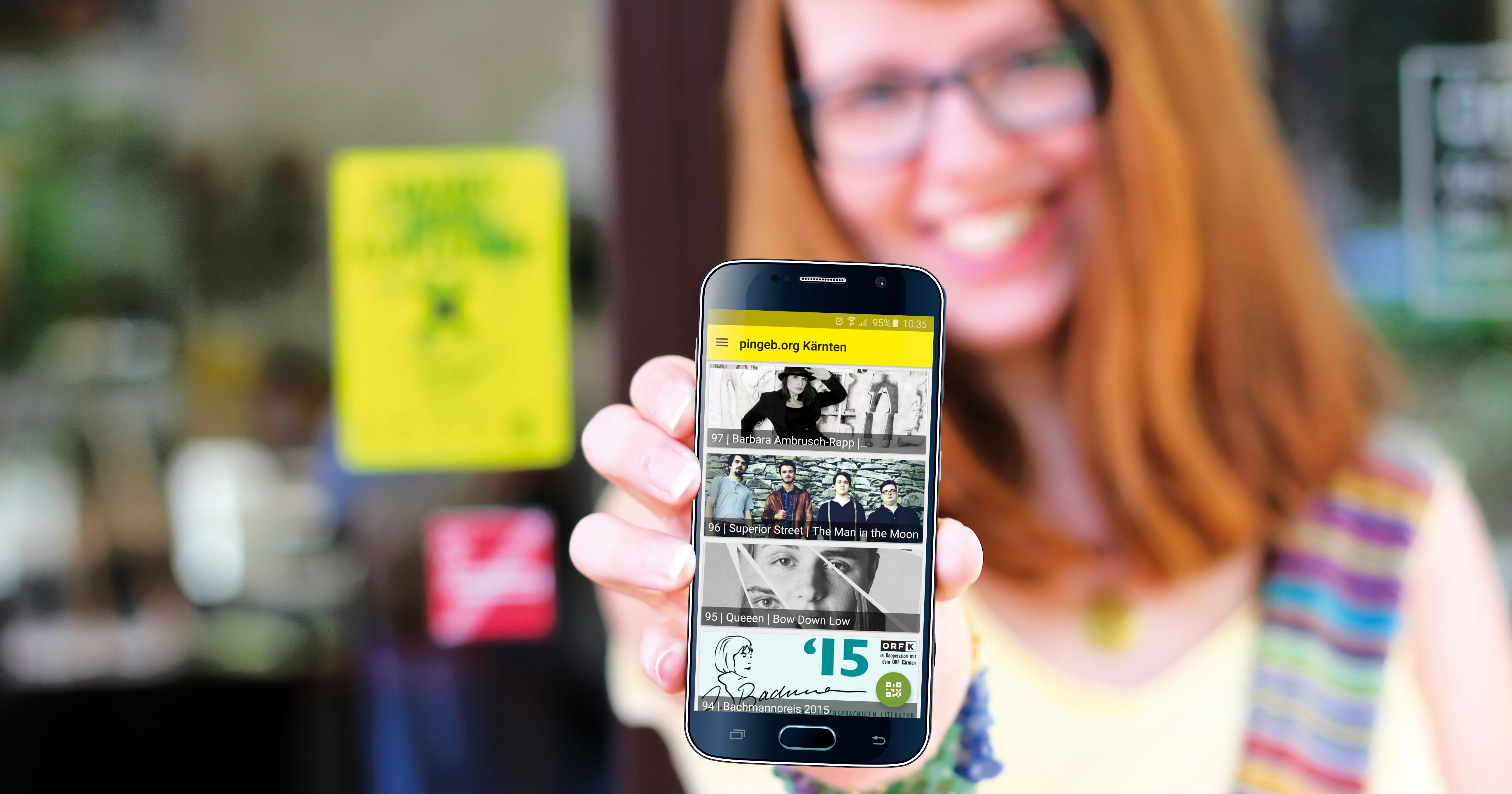 Projekt Ingeborg: Mit Smartphones regionale Künstler kennenlernen.